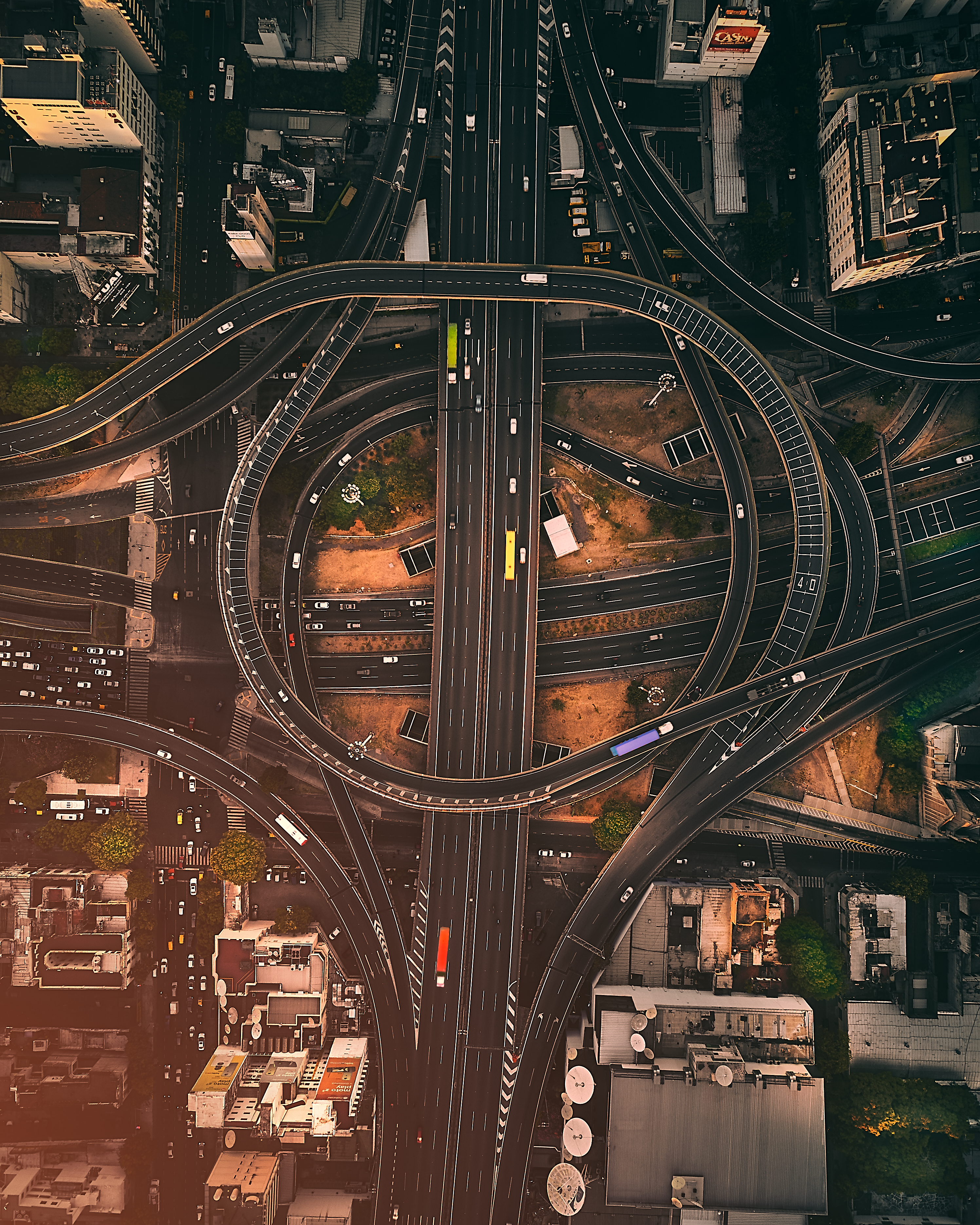 Intersection of 9 de Julio Avenue & Autopista 25 de Mayo